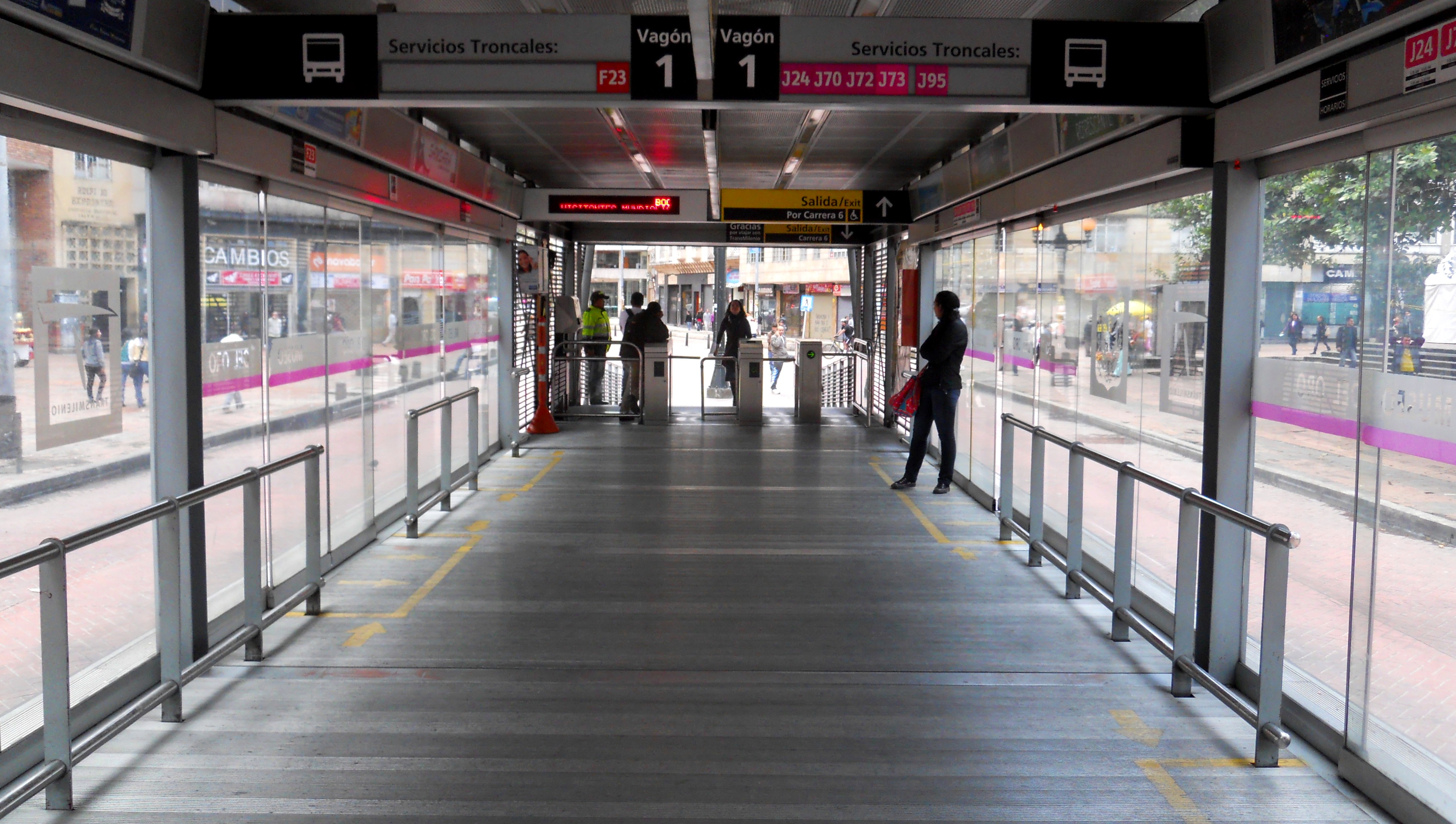 Interior de la estación Museo del Oro del sistema Transmilenio en el centro de Bogotá.